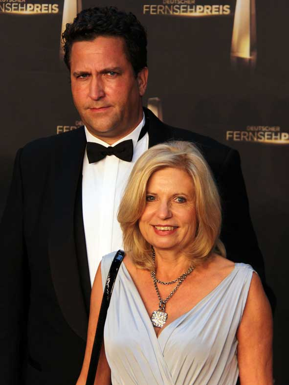 Sabine Postel und Christian Meckel beim Deutschen Fernsehpreis 2012